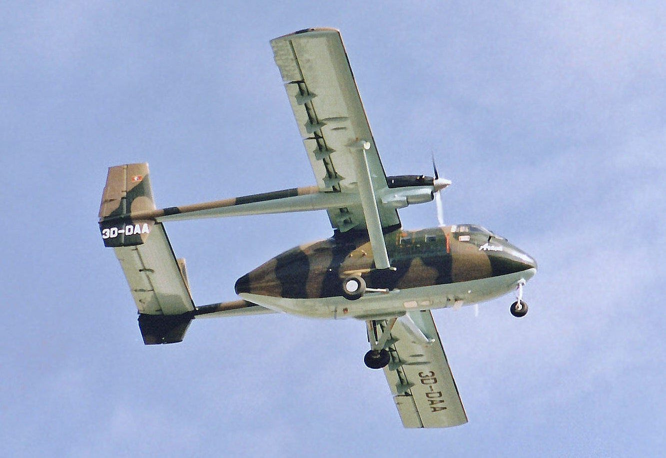 Swazi DF Arava 201 3D-DAA